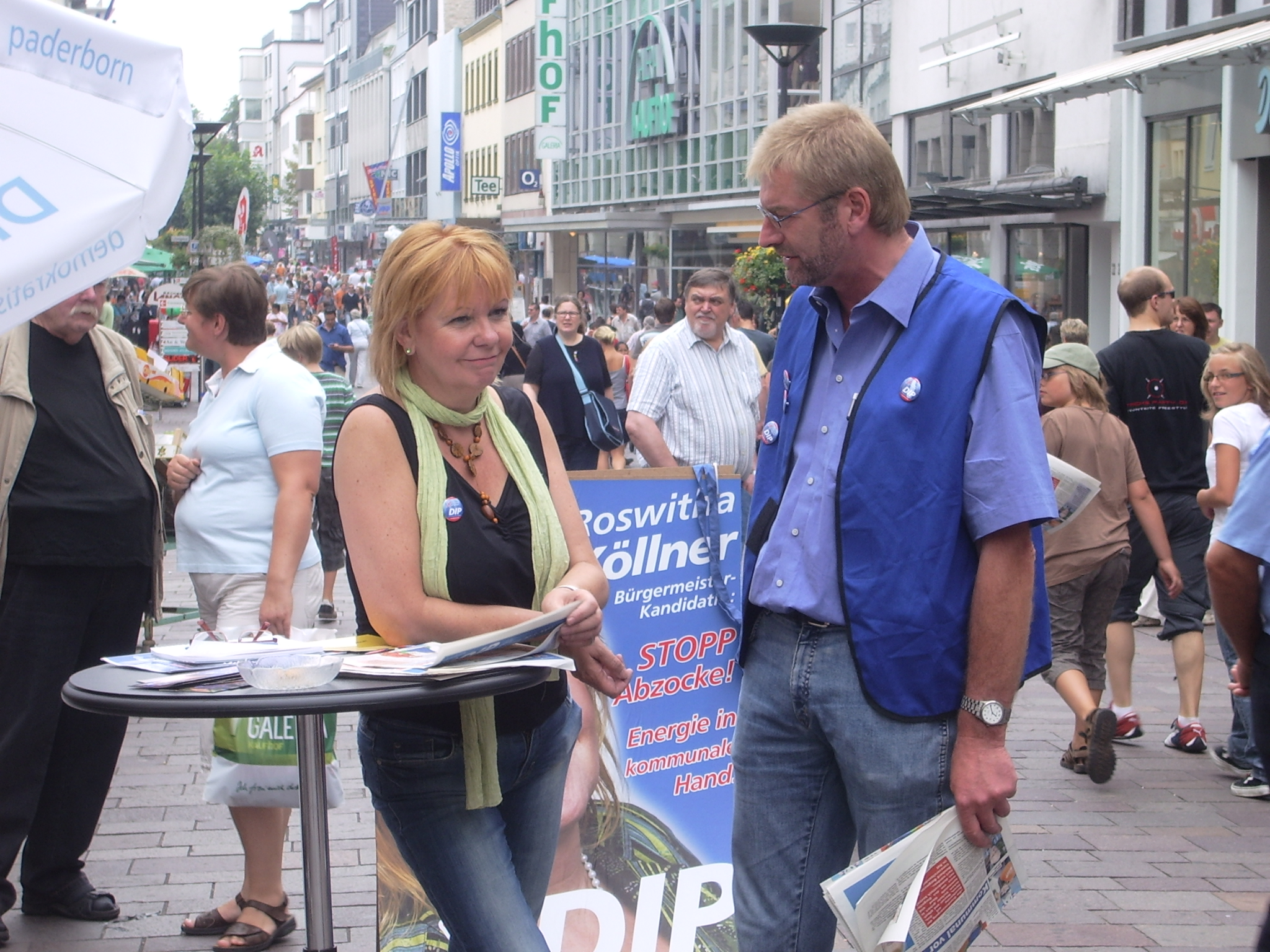 Paderborn: Roswitha Köllner und Reinhard Borgmeier am Wahlstand der Demokratischen Initiative Paderborn zu den Kommunalwahlen in Nordrhein-Westfalen 2009